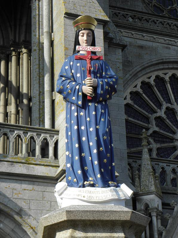 Statue de Notre-Dame de Pontmain sur le parvis de la basilique Notre-Dame d'Espérance de Pontmain (53).